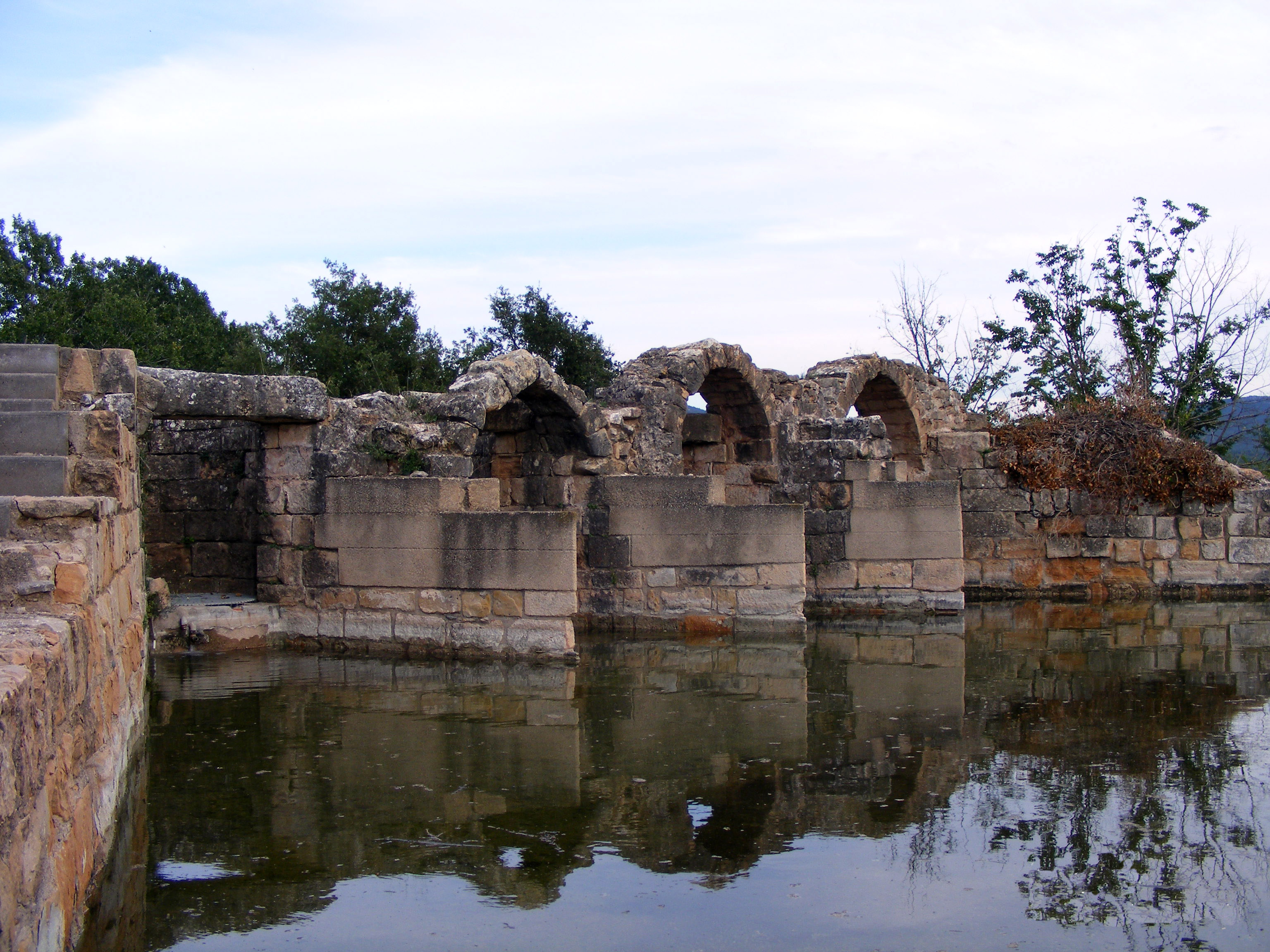 Interior del Molí de la Volta